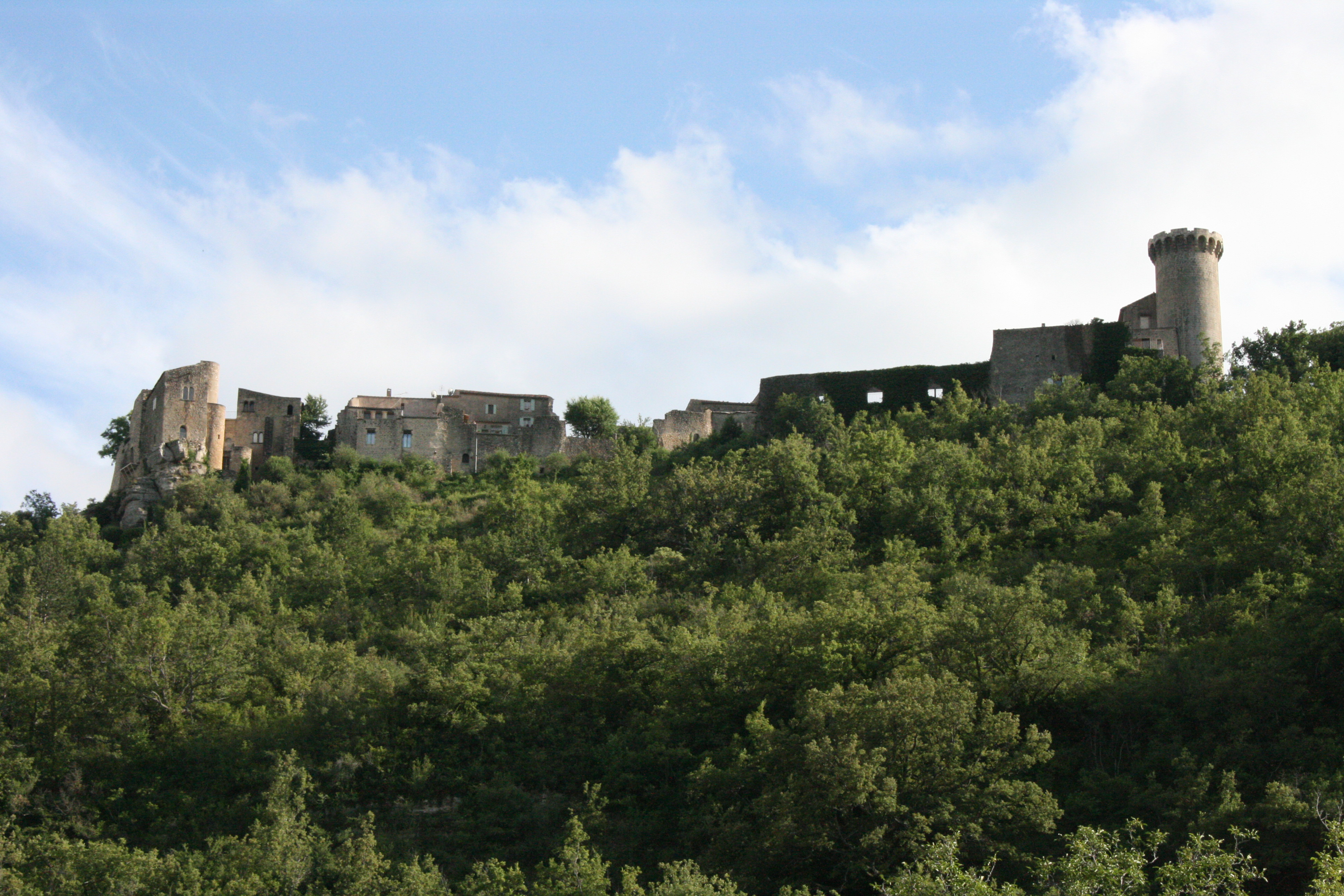 Viens, département du Vaucluse (France)